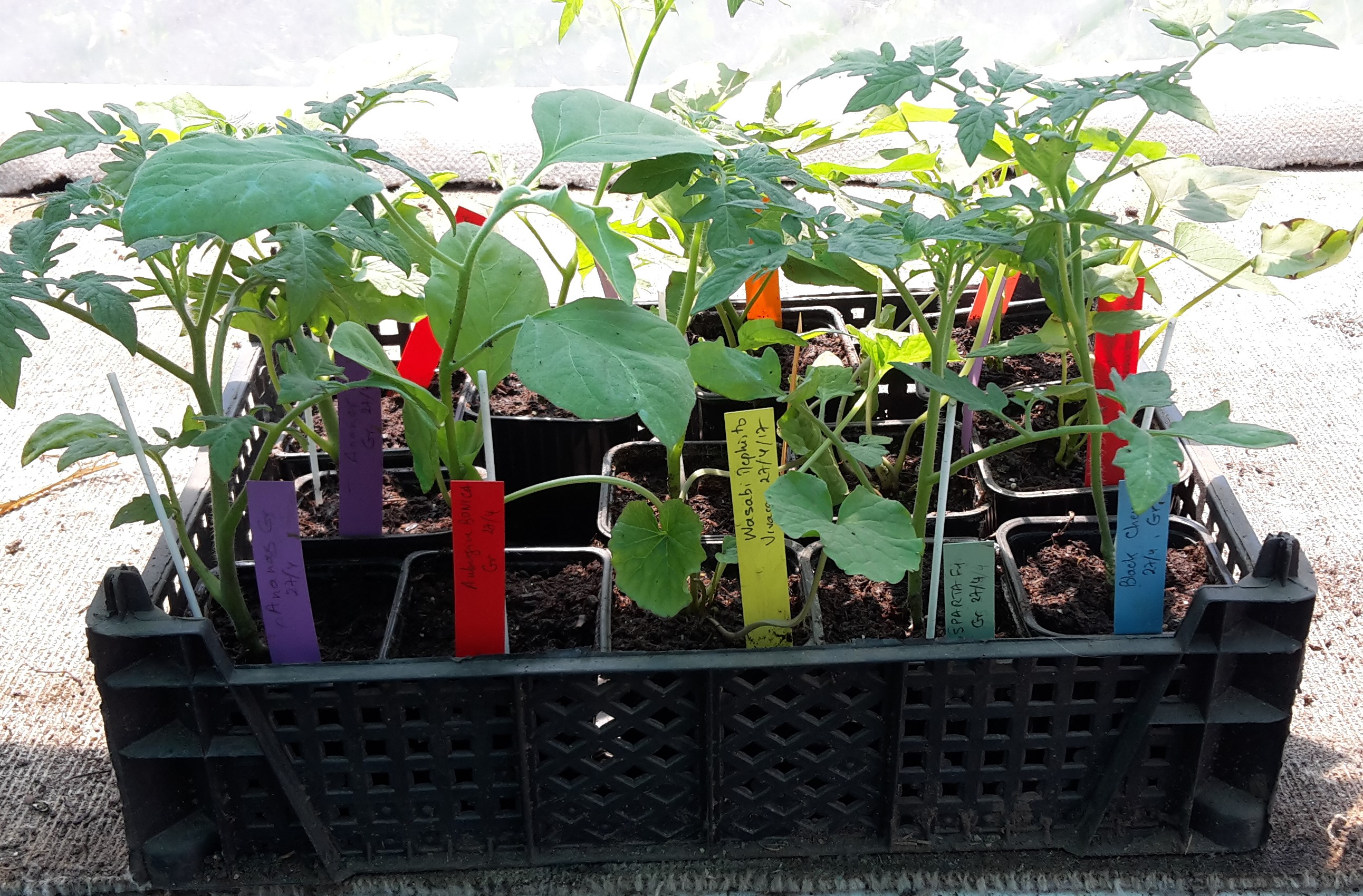 Divers plants de légumes